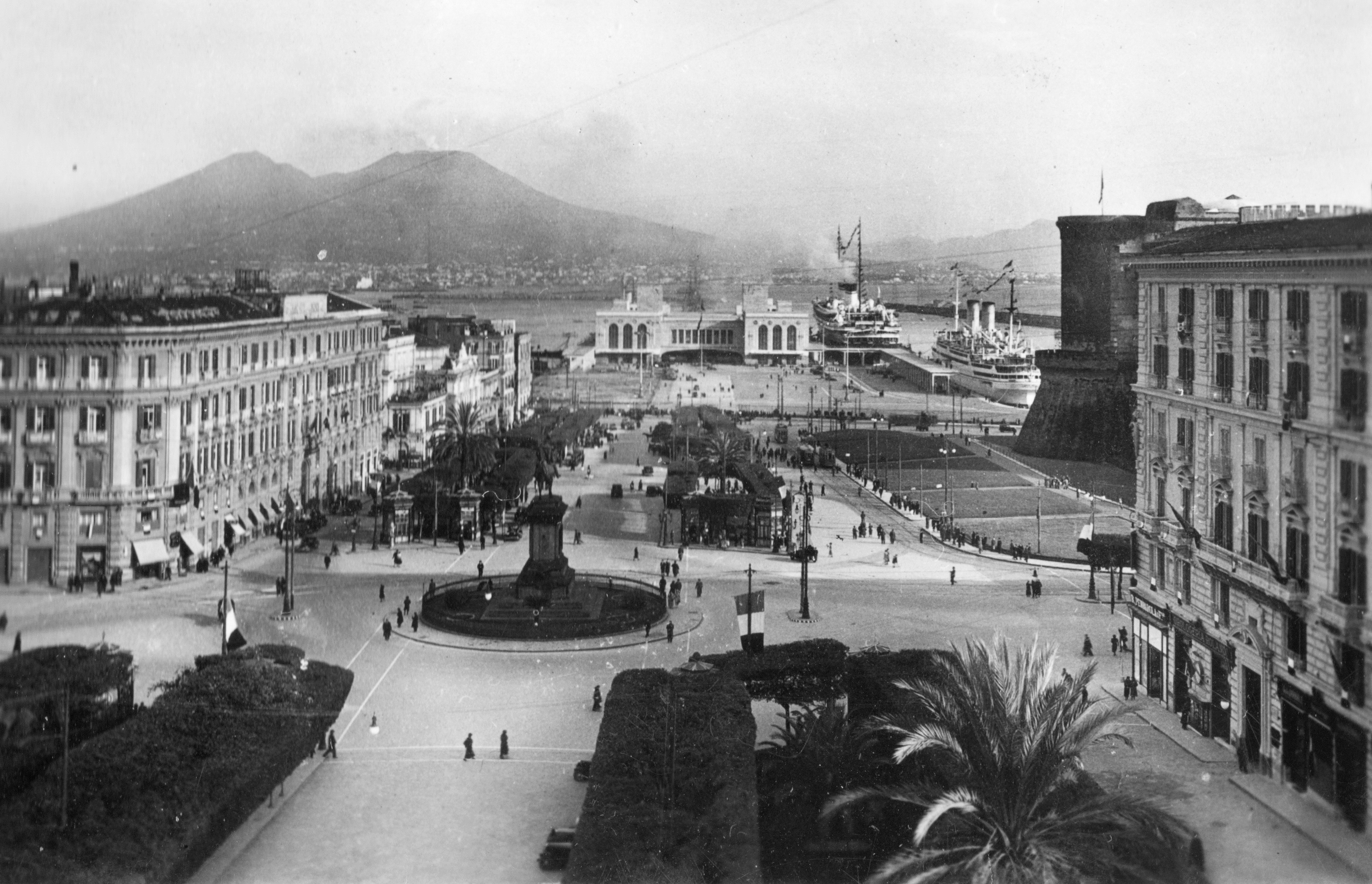 Piazza Municipio, szemben a Piazzale Stazione Marittima, háttérben a Vezúv. Location: Italy, Naples Tags: picture, ship, port, volcano Title: Piazza Municipio, szemben a Piazzale Stazione Marittima, háttérben a Vezúv.